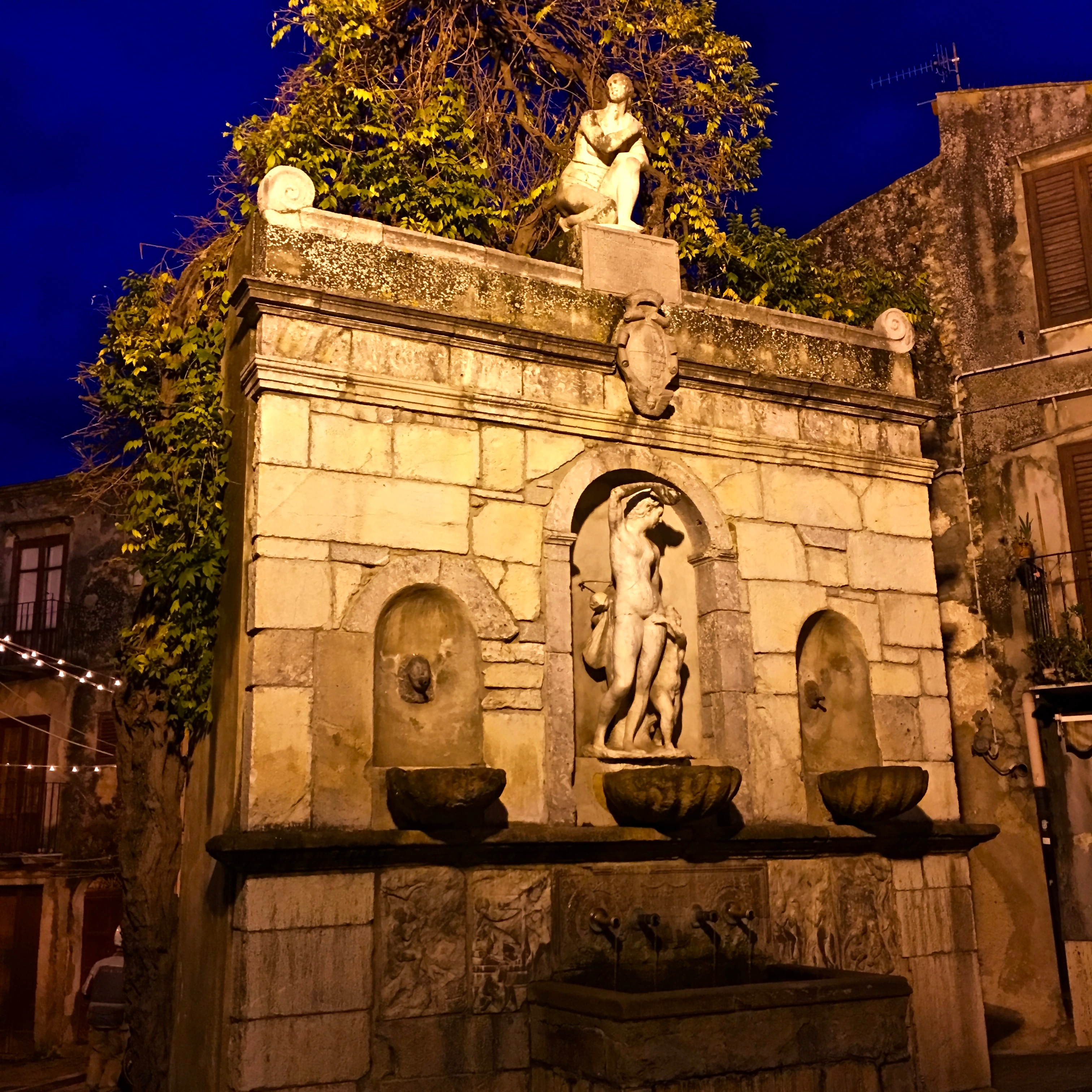 La Fontana della Venere Ciprea o dei Quattro Cannoli, in corso Umberto I, a Castelbuono